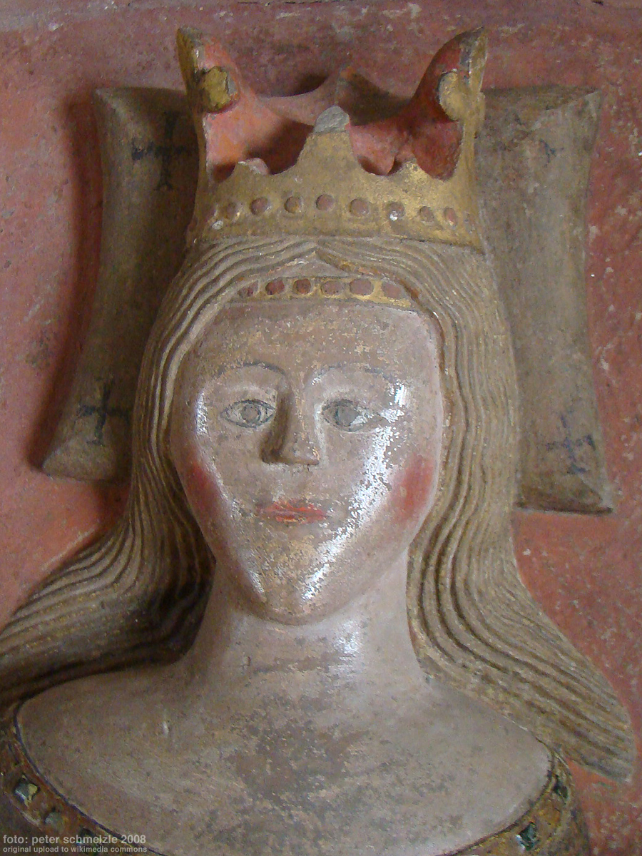 Notburga von Hochhausen, Darstellung auf dem Notburgagrab in der Notburgakirche in Haßmersheim-Hochhausen